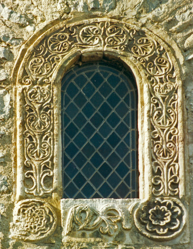 Abadia de Santa Maria d'Arles. Finestra. Vallespir, França